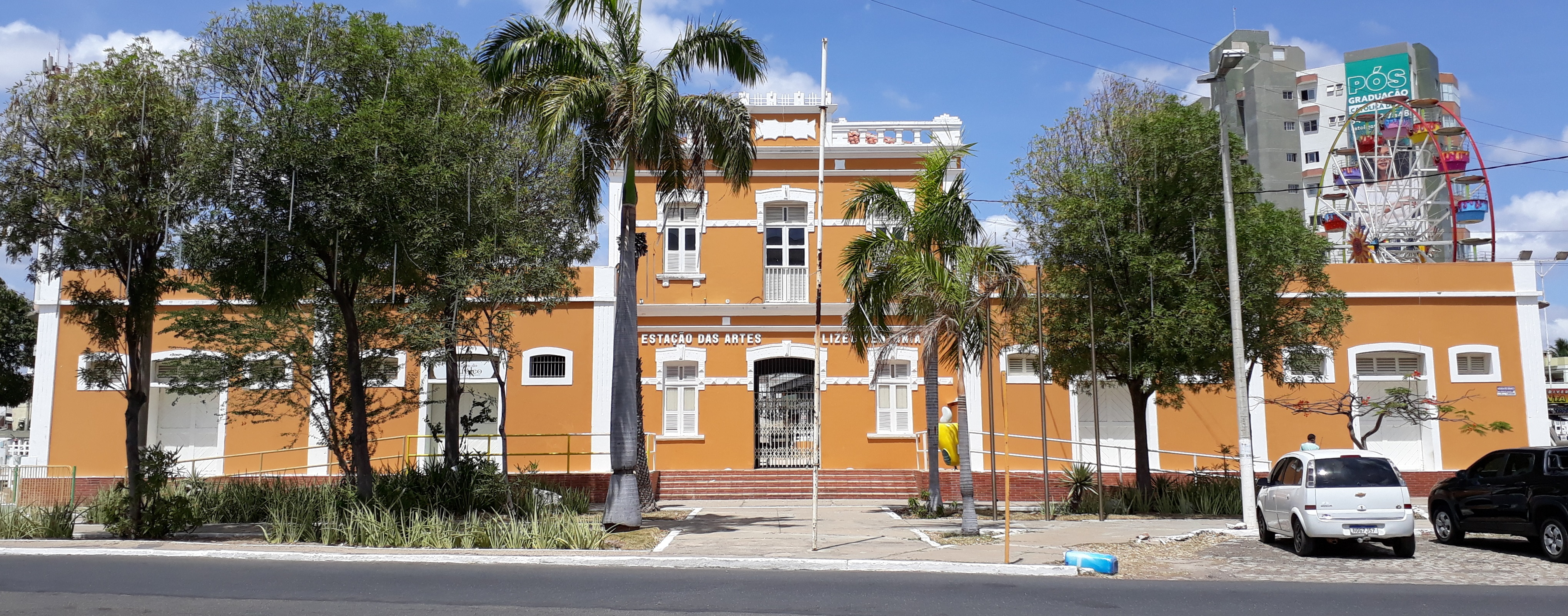 Estação das Artes Elizeu Ventania em Mossoró, Rio Grande do Norte (Brasil)